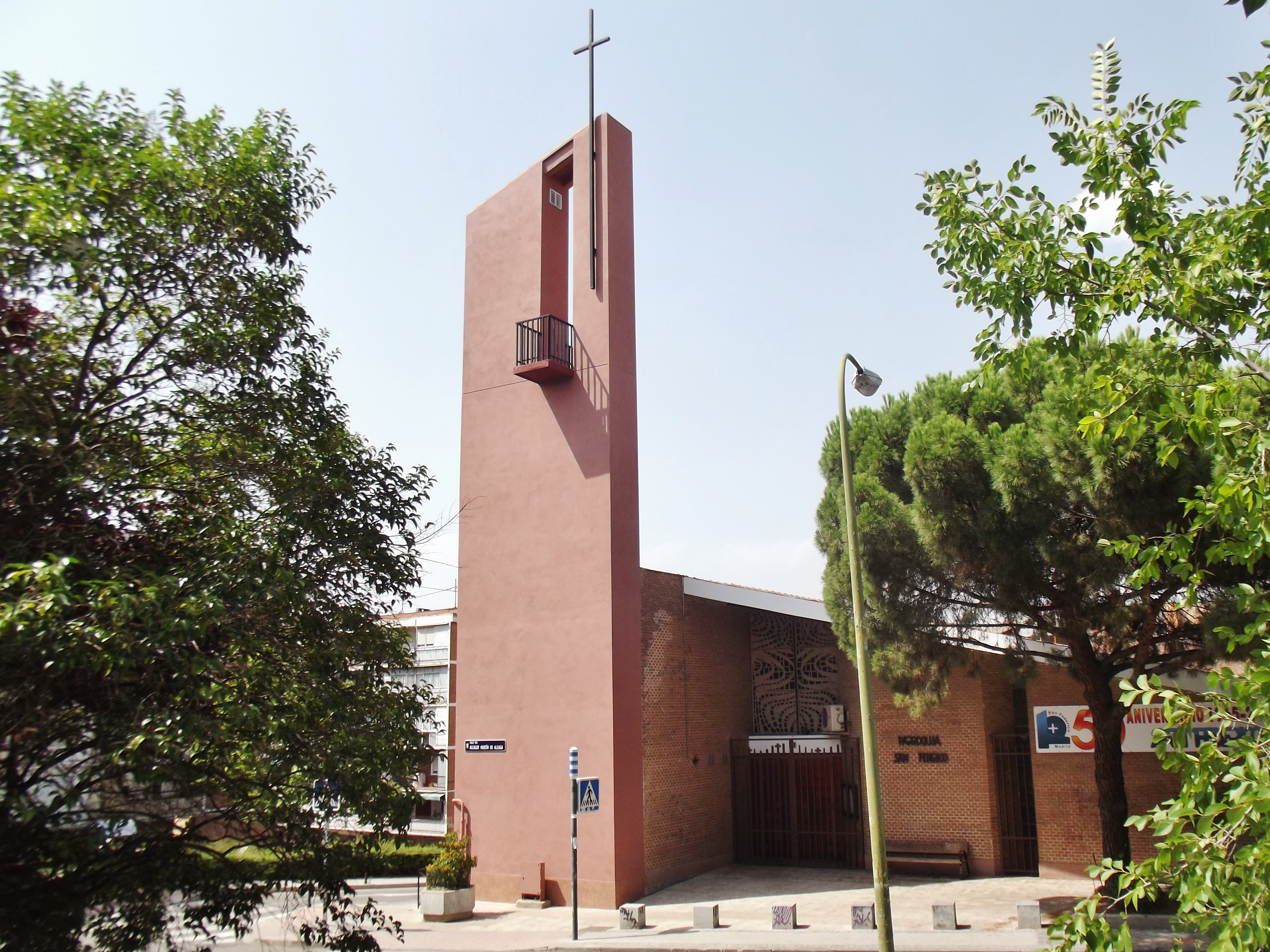 Parroquia de San Federico, Madrid.Online database: COAM.